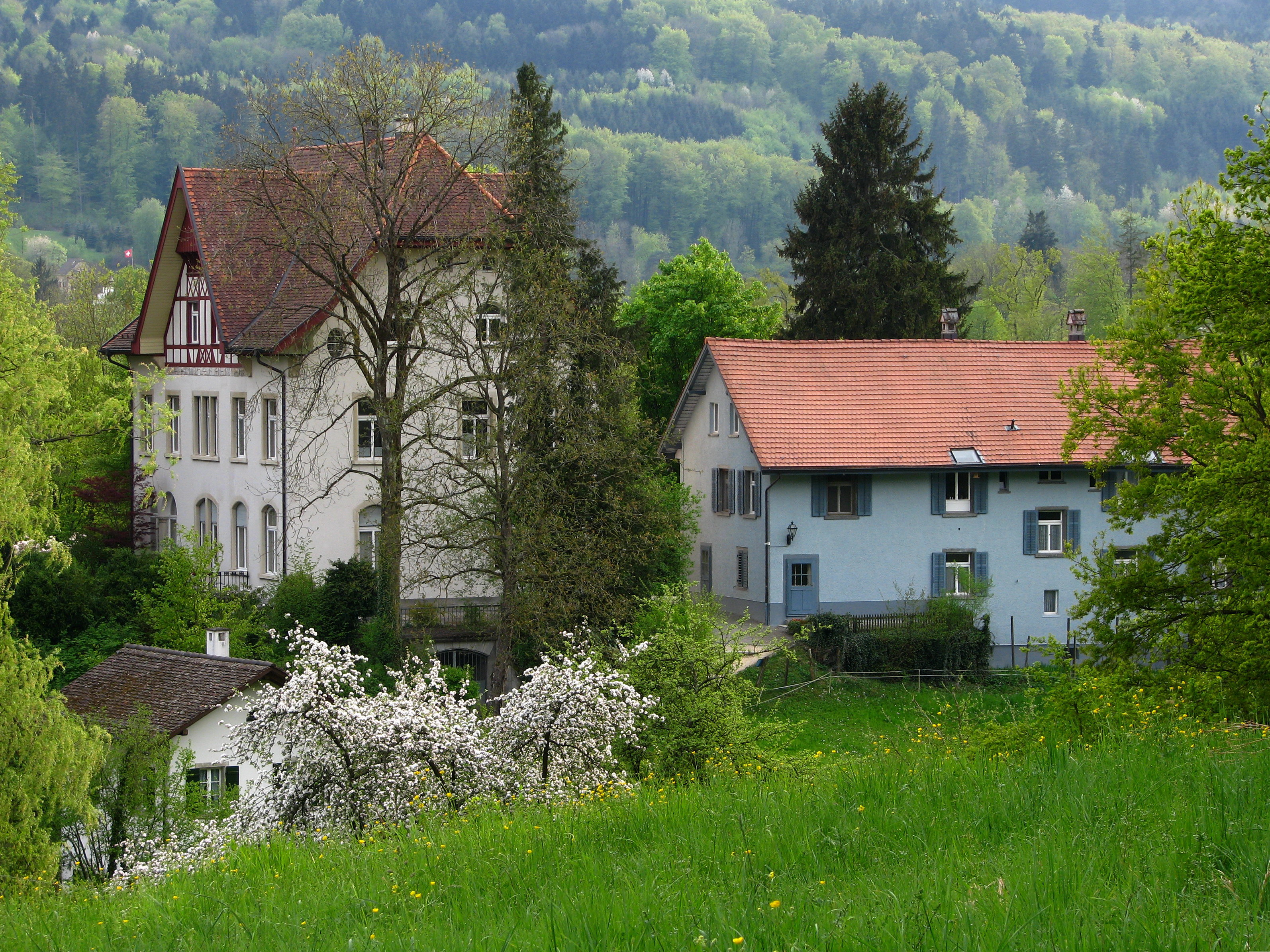 Gut Katzensee in Regensdorf (Switzerland)